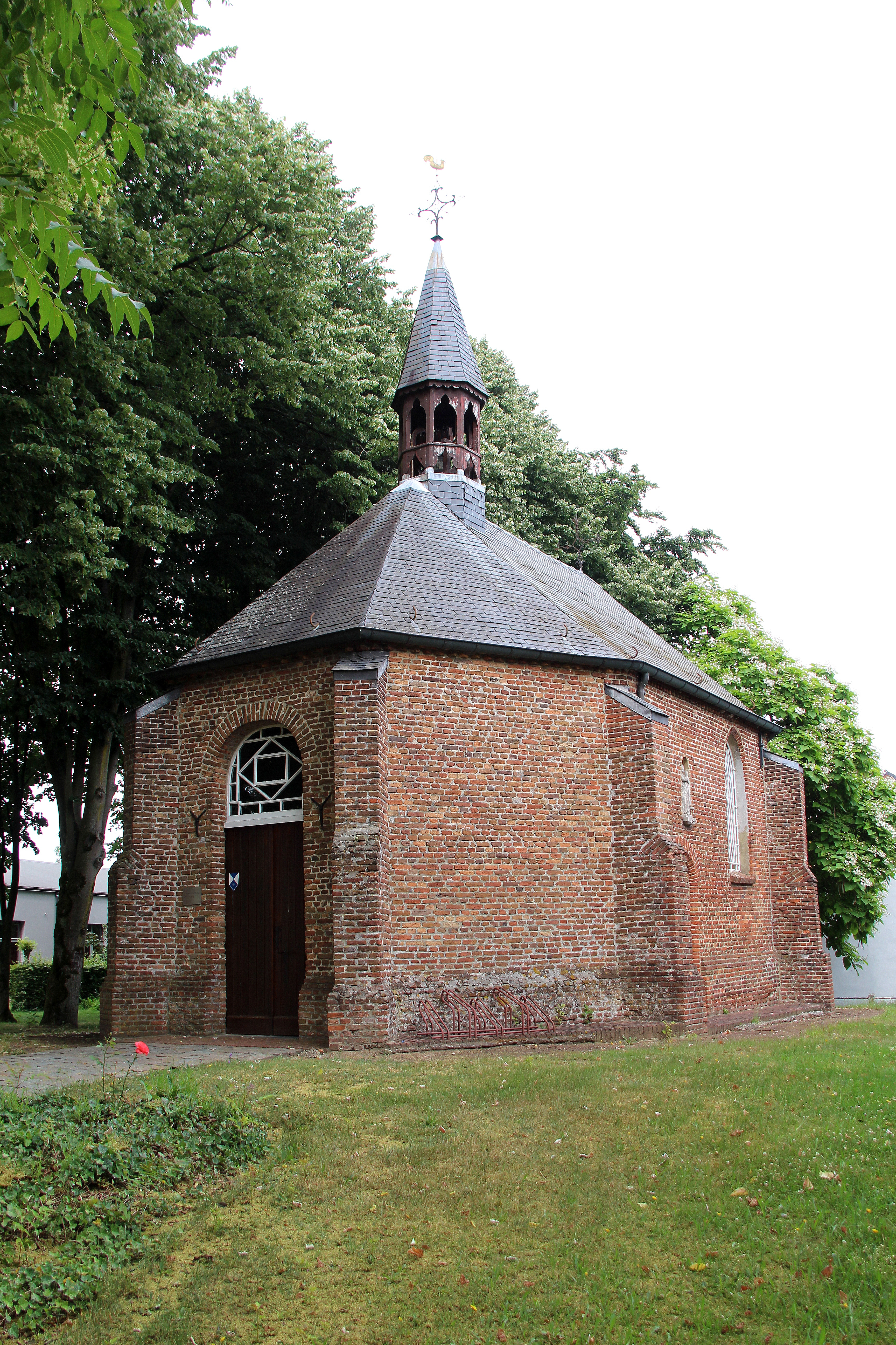 De Sint-Pieterskapel is vermoedelijk de oudste kerk van Retie en werd reeds vermeld in een schepenbrief van 1355. De huidige kapel bestaat enkel nog uit het zeventiende-eeuwse koor dat overbleef na een brand in 1889. De oorspronkelijke Sint-Pieterskapel was 25 meter lang en 7,5 meter breed. De Sint-Pieterskapel is een kapel tegen kinkhoest.